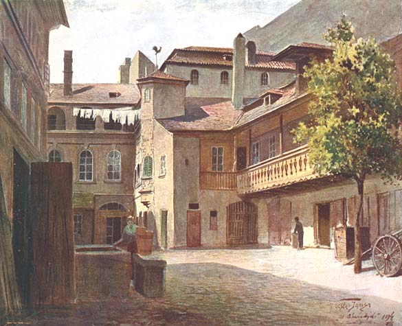 Dvů domu U Císařských, nároží Václavského náměstí a Jindřišské (zbořen 1895)